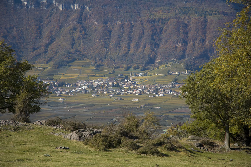 Tramin von Castelfeder aus gesehen